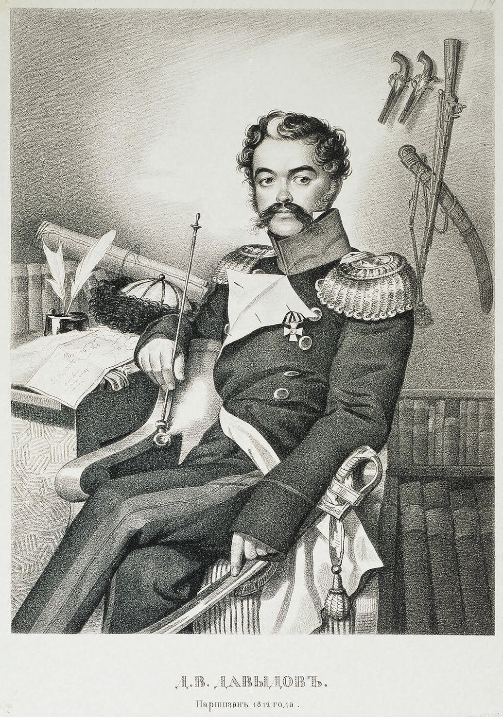 Портрет Дениса Васильевича Давыдова